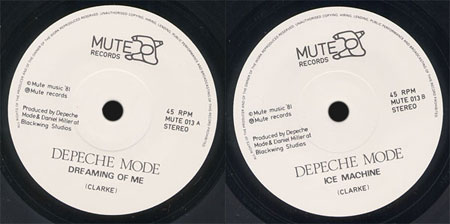 Label der Single "Dreaming of me"